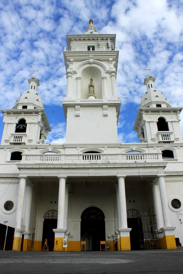 Vista de la fachada principal de la Catedral Nuestra Señora de los Pobres.